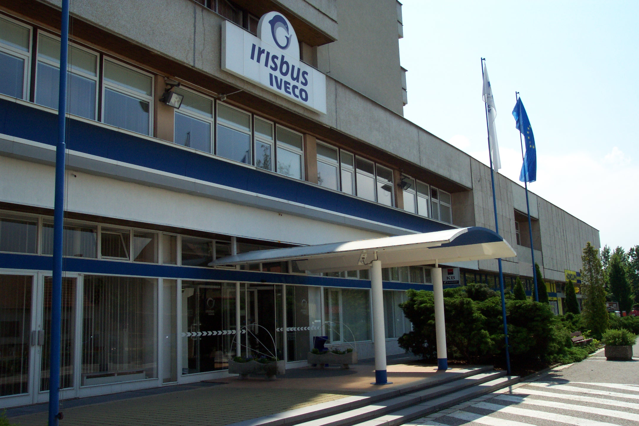 Vysoké Mýto - Budova společnosti Irisbus (dříve Karosa ) - Vysoké Mýto - The building of Irisbus/Karosa Company